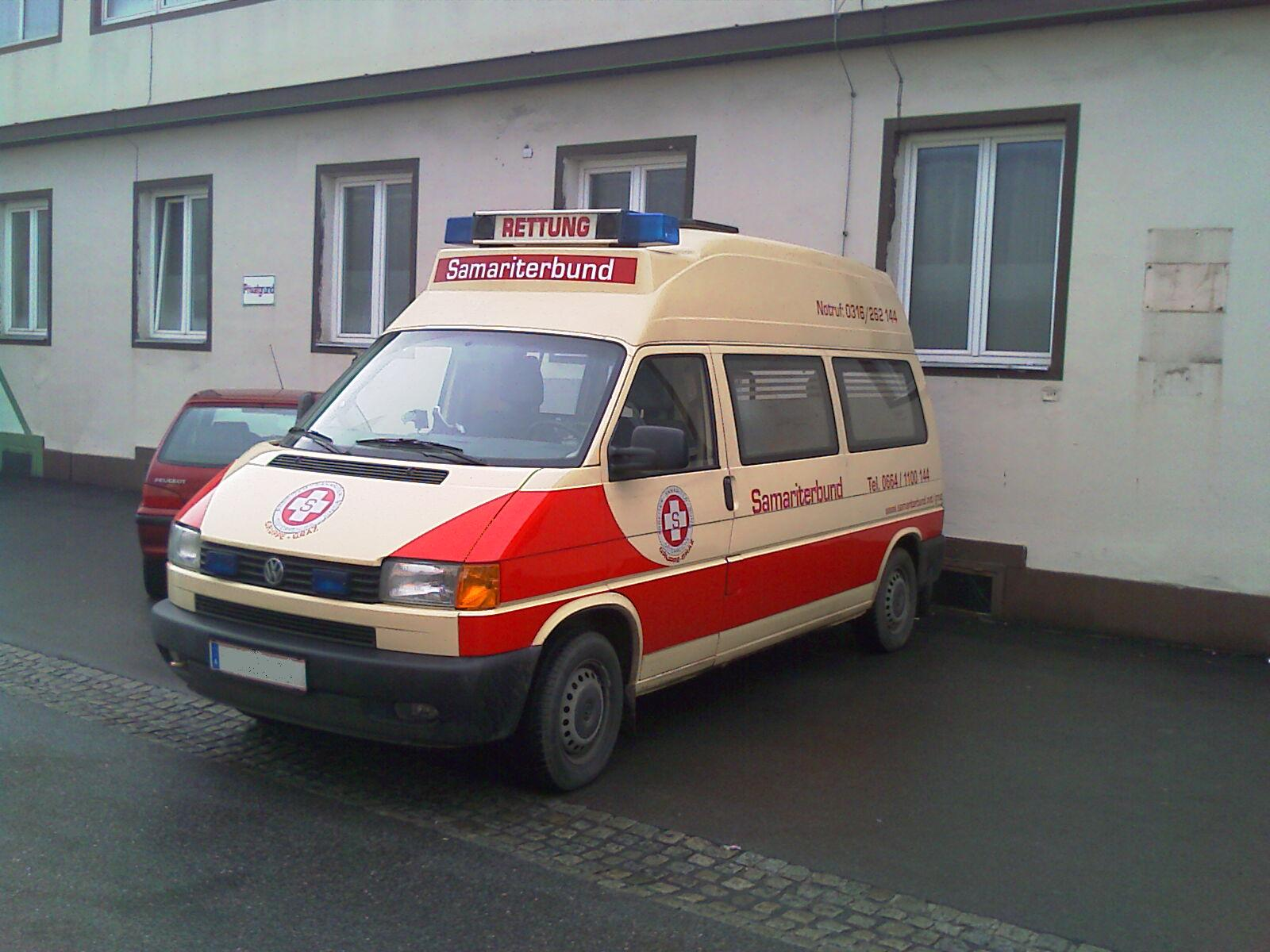 Rettungswagen des ASBÖ-Gruppe Graz